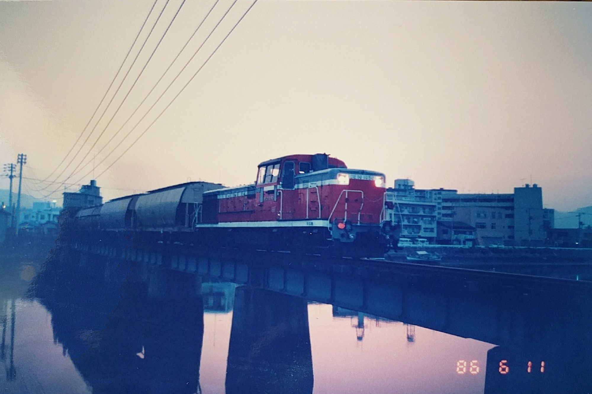 猿猴川橋梁を渡る宇品への下り貨物。旧大須口駅→旧東段原駅間、1986年6月11日午前5時過ぎごろ。